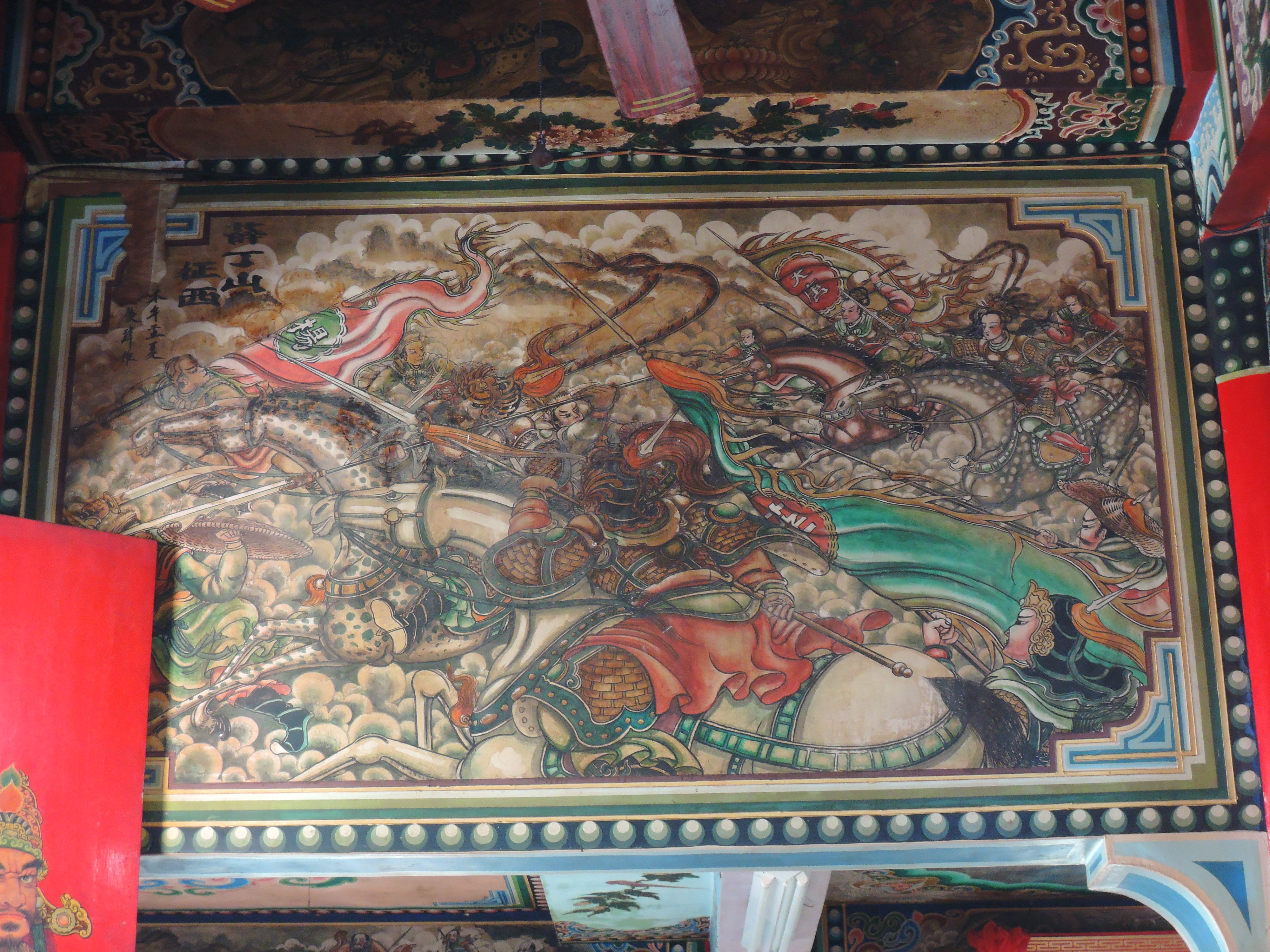 菜園東安宮，主祀朱府王爺。